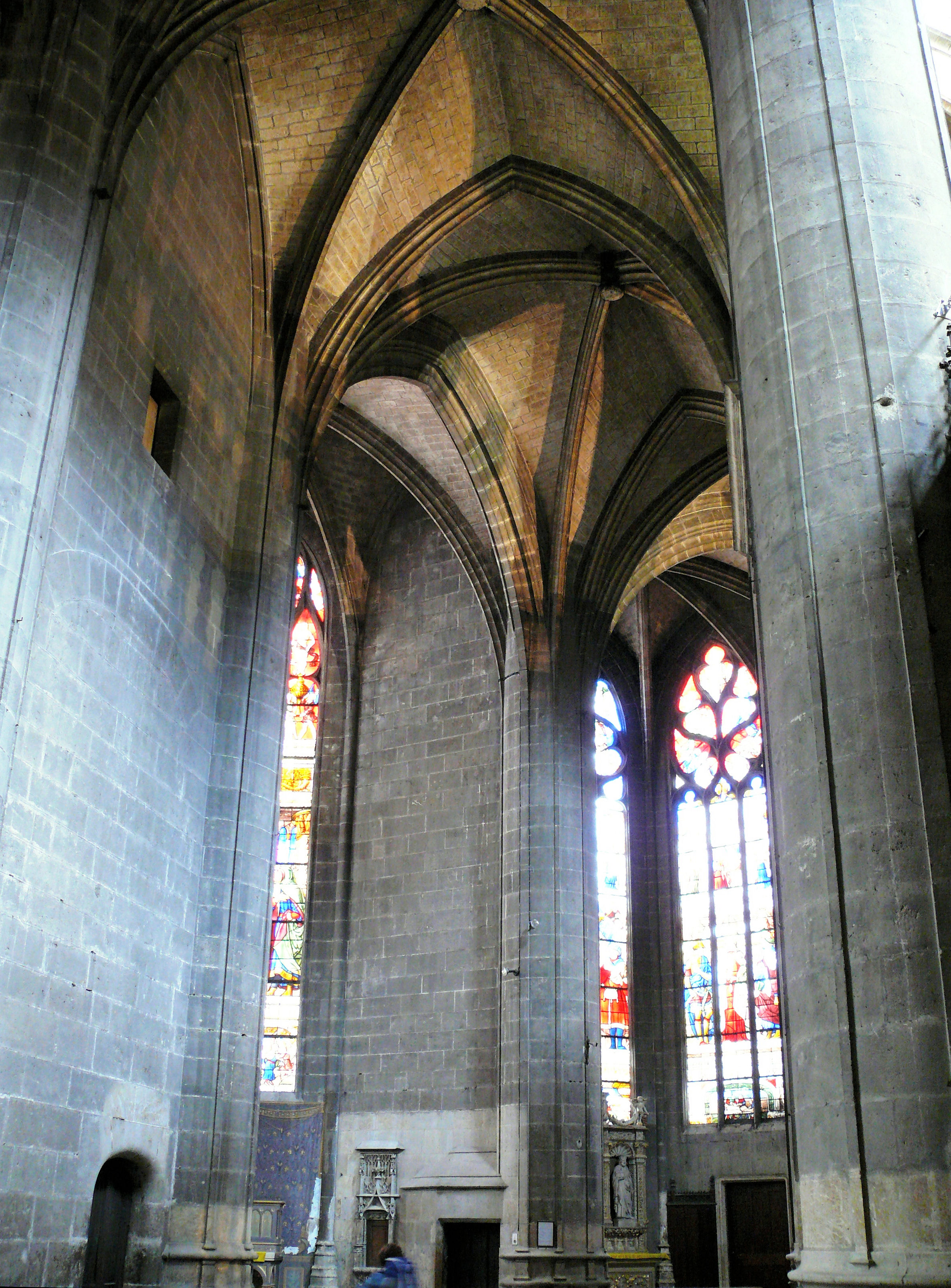 Cathédrale Sainte-Marie d'Auch - Déambulatoire